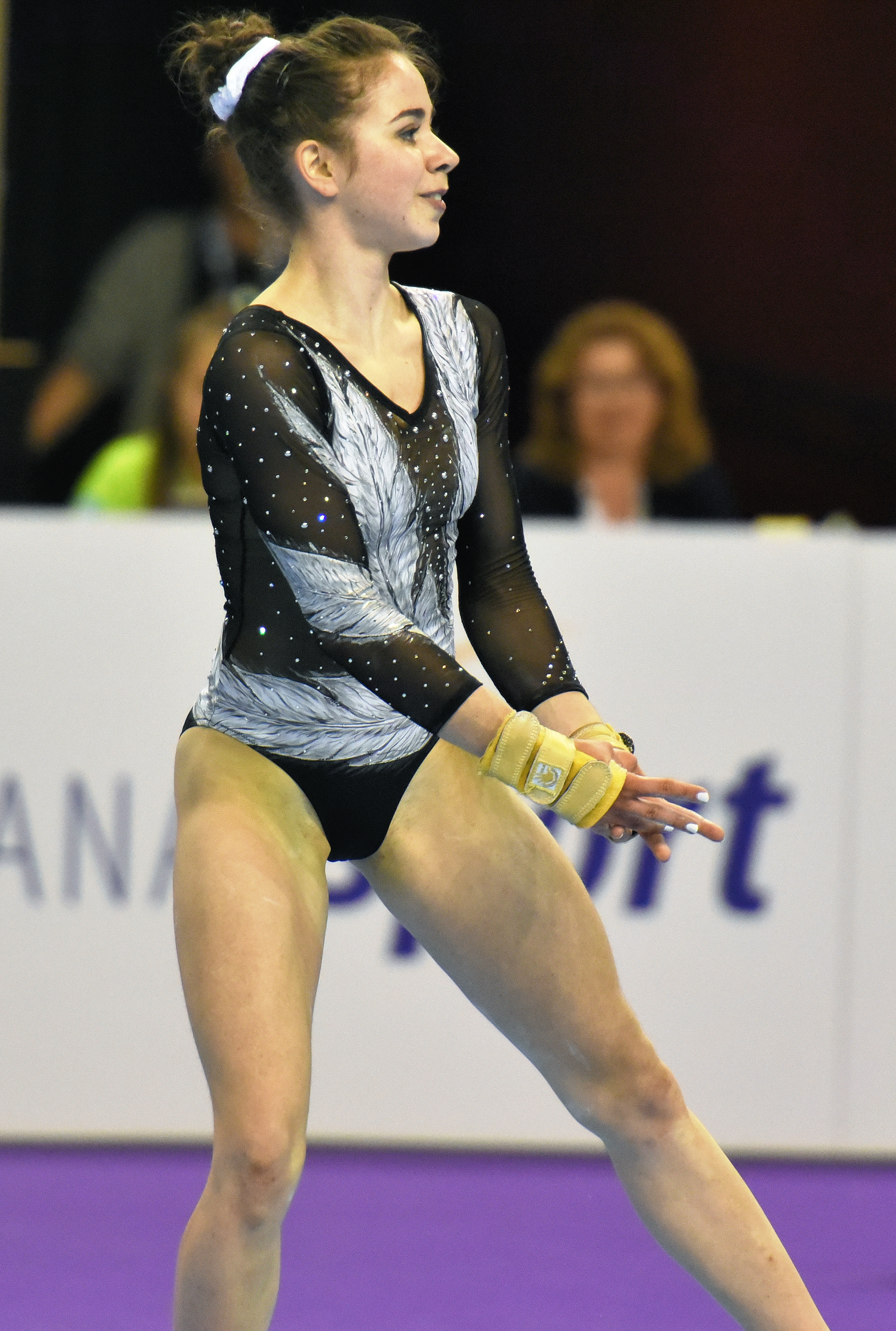 Deutsche Meisterschaften Gerätturnen Mehrkampf weiblich Wettkampf beim Internationalen Deutschen Turnfest Berlin 2017. Abgebildet ist Leah Grießer.